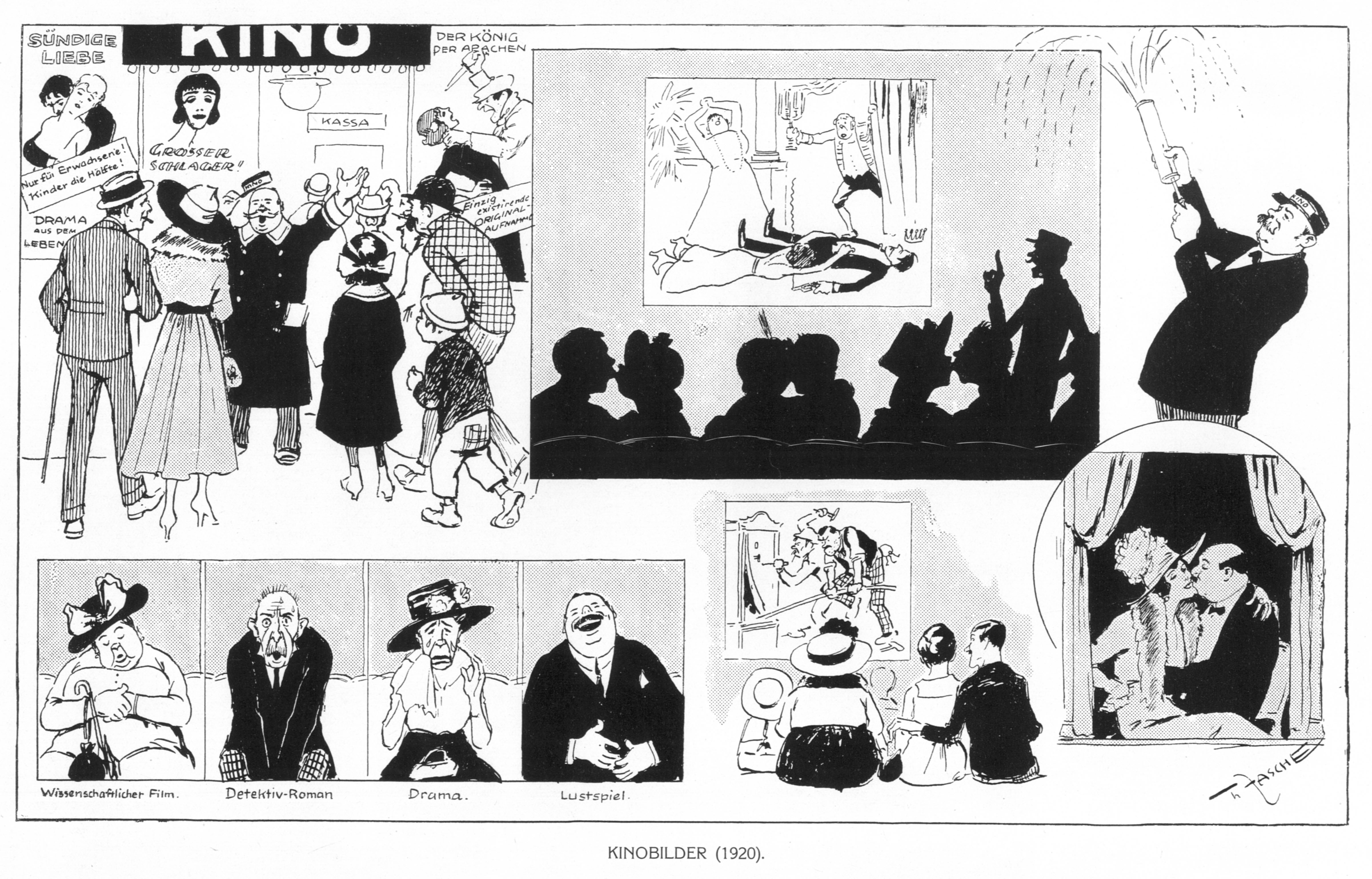 Karikatur